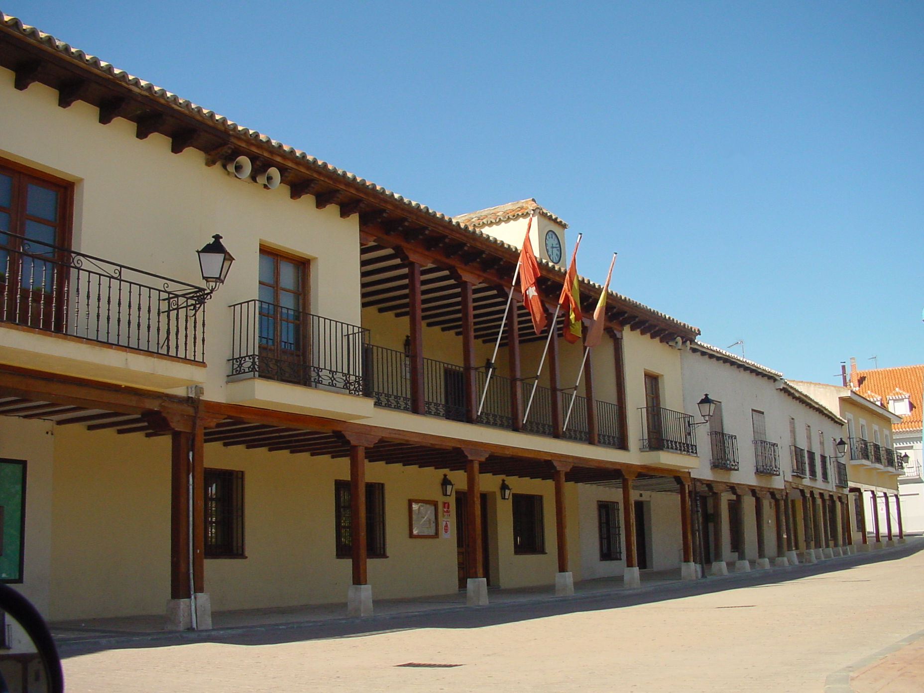 Ayuntamiento de Torrejón de Velasco.